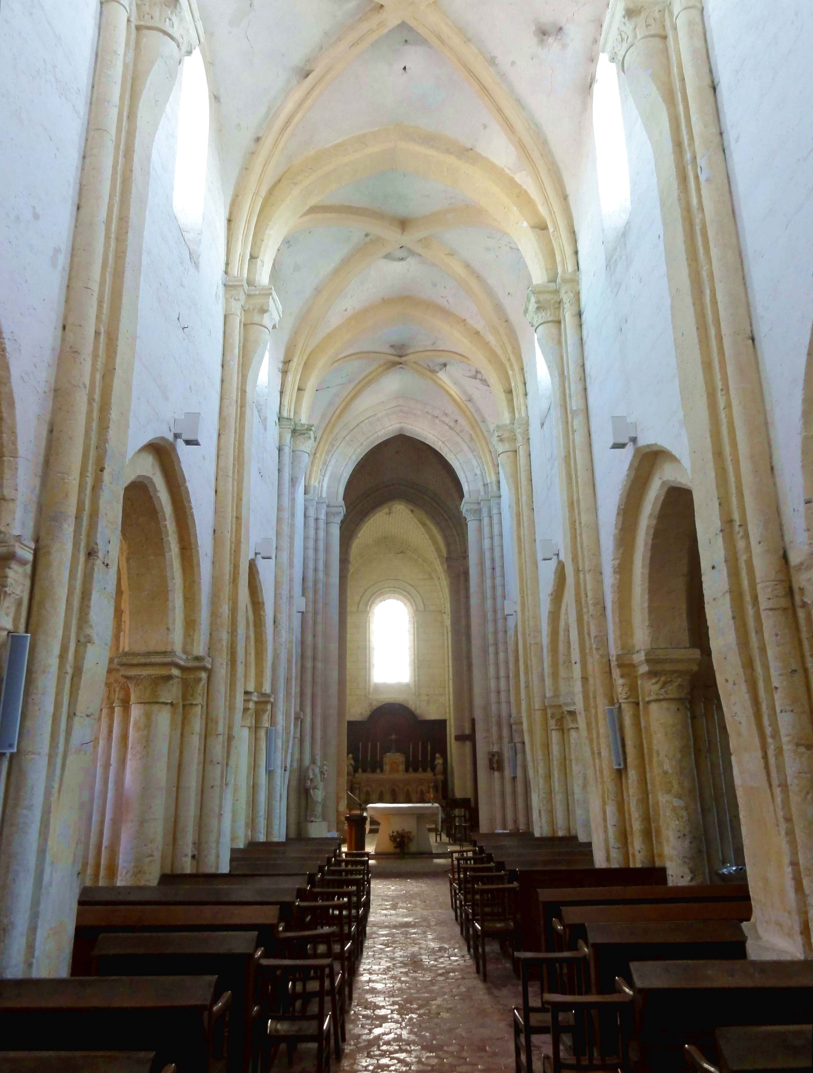 Intérieur de l'église - voir titre.